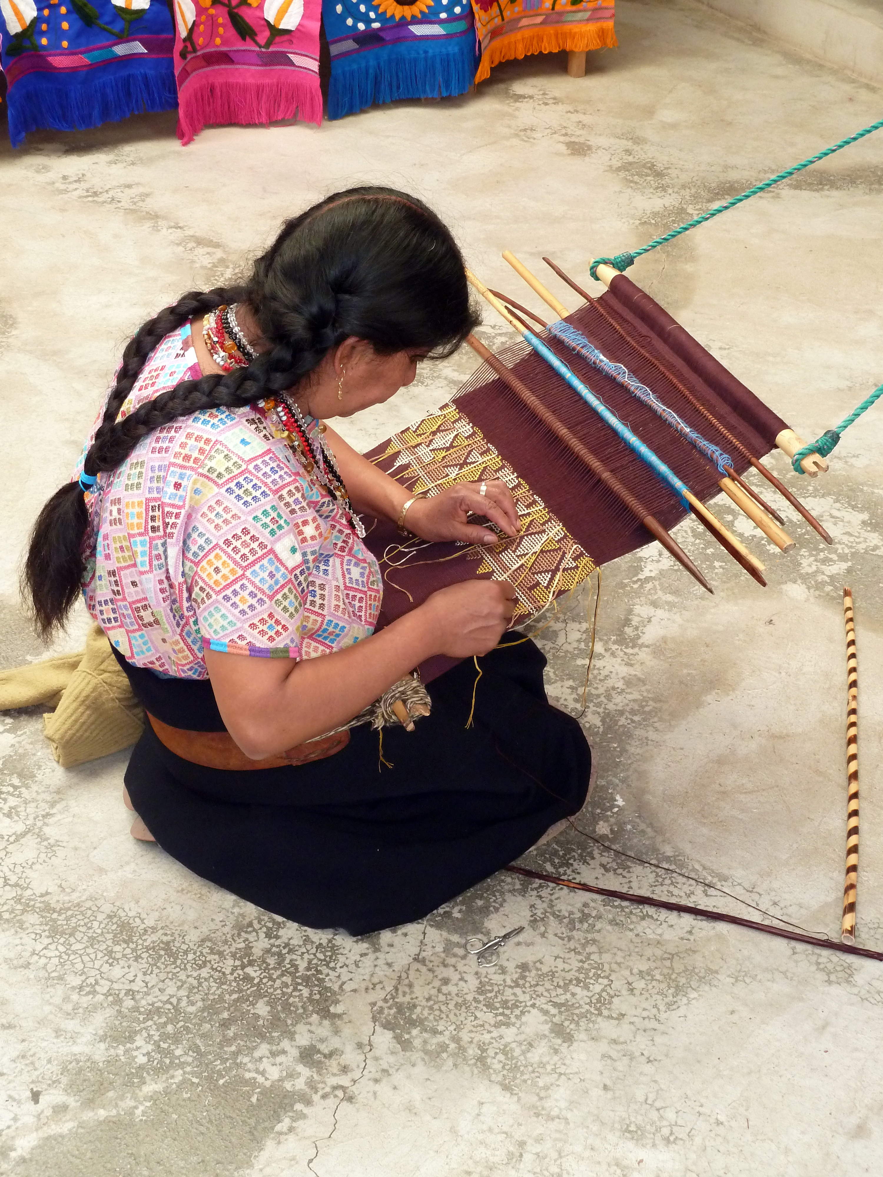 Day 7: San Juan Chamula